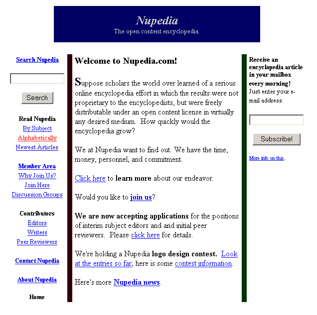 Een screenshot van Nupedia voordat het verloren gaat. Uit EIGEN collectie.